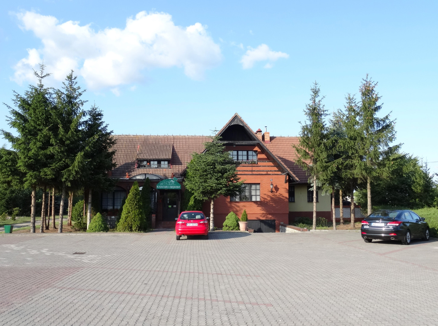 Prądocin - karczma Zbyszko, gmina Nowa Wieś Wielka, powiat bydgoski